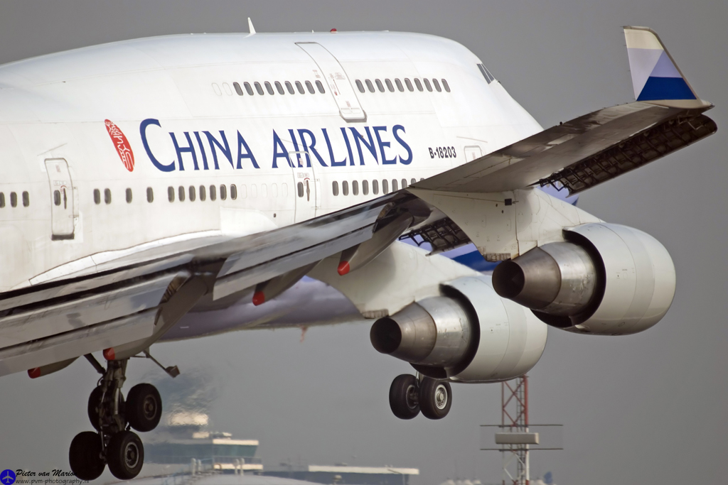 Boeing 747-409 Amsterdam schiphol [AMS / EHAM] 30-06-2009